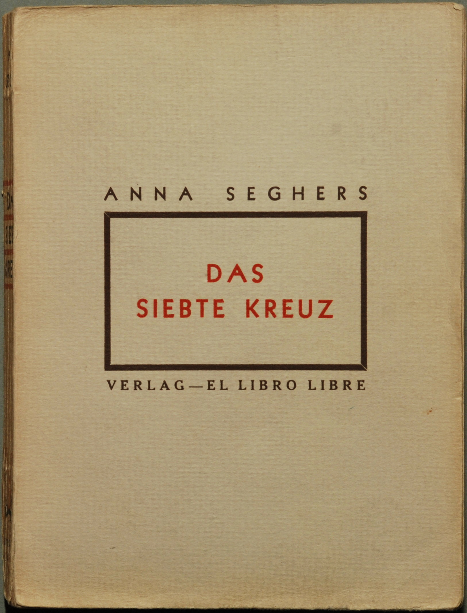 Seghers, Anna: Das siebte Kreuz. Roman aus Hitlerdeutschland. Mexiko [Stadt]: El Libro Libre 1942, 468 Seiten + 3 Seiten Verlagsanzeigen + 1 Seite Druckvermerk. Erstdruck (Wilpert/Gühring² 13)